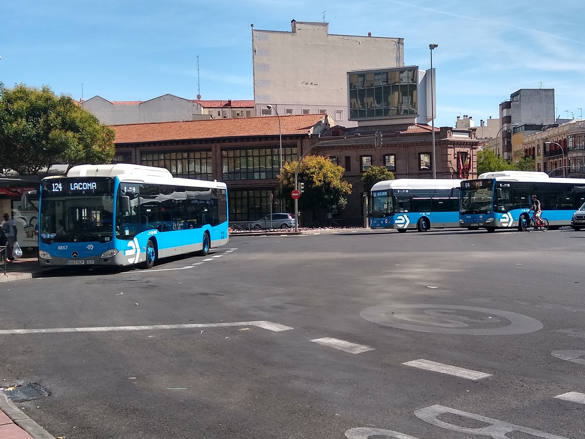 Tres autobuses coinciden en el mismo plano en la glorieta de Cuatro Caminos